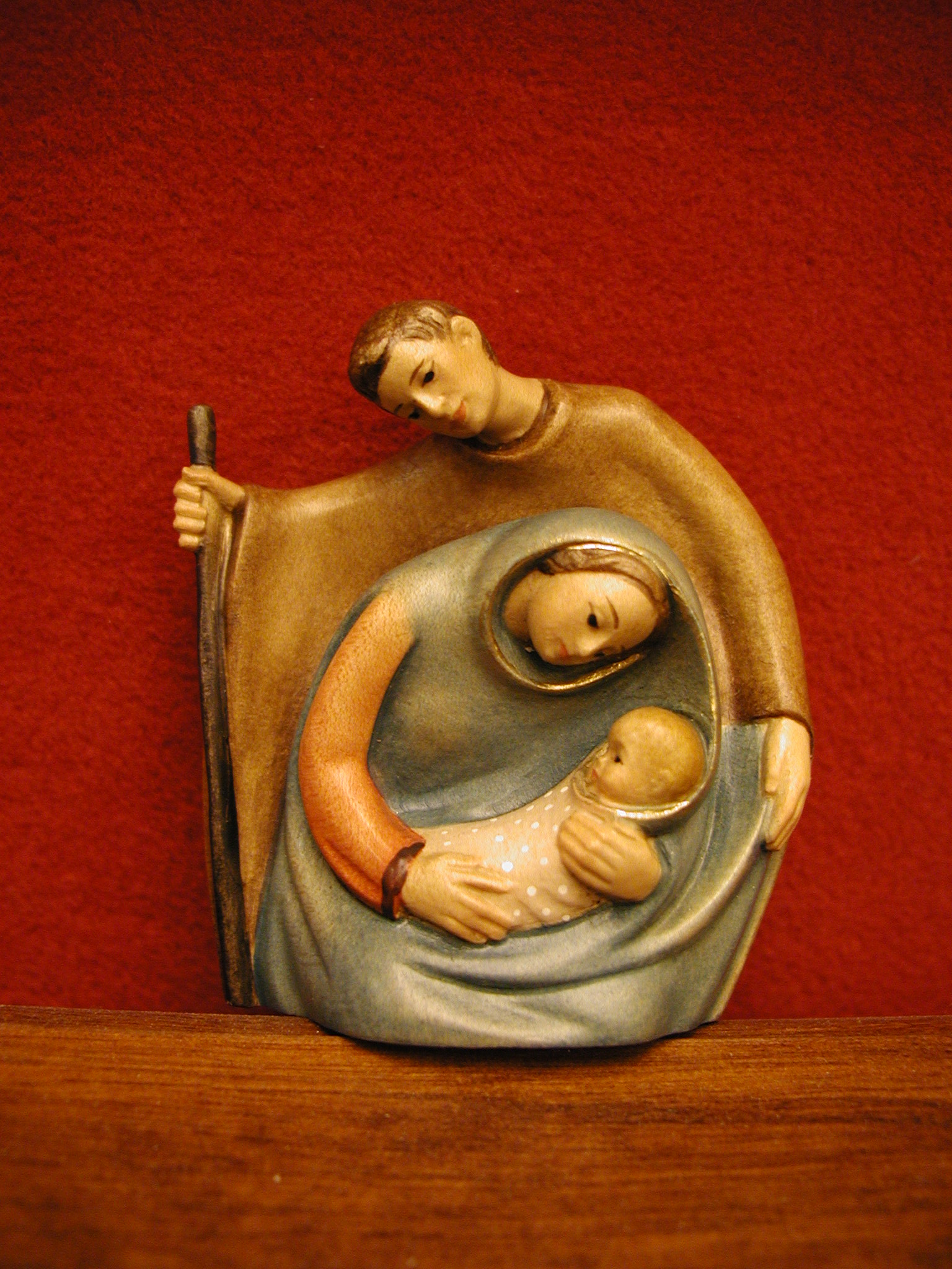 Romano d'Ezzelino. Opera esposta alla Mostra dei Presepi